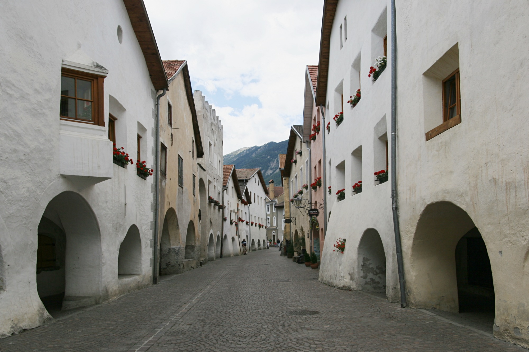 Die Laubengasse in Glurns - The Laubengasse in Glurns own image, taken August 04, 2005 Photographer: Herbert Ortner, Vienna, Austria